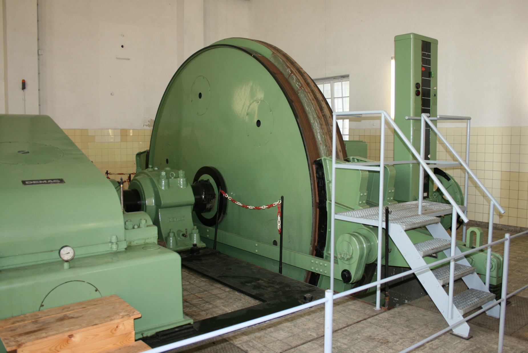 Fördermaschine des Bergbaumuseums Siciliaschacht.